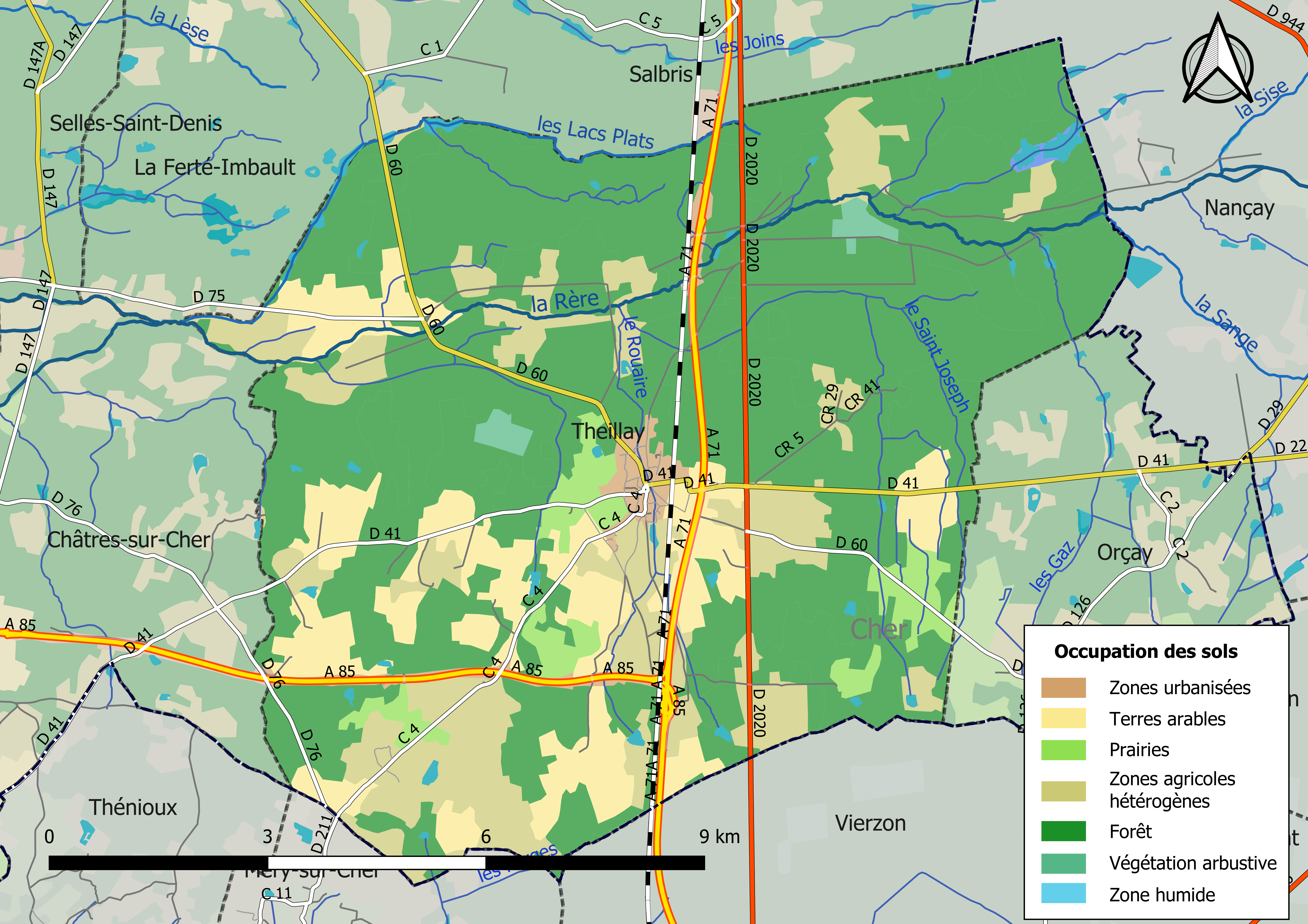 Carte des infrastructures et de l’occupation des sols en 2018 de la commune de Theillay (France).